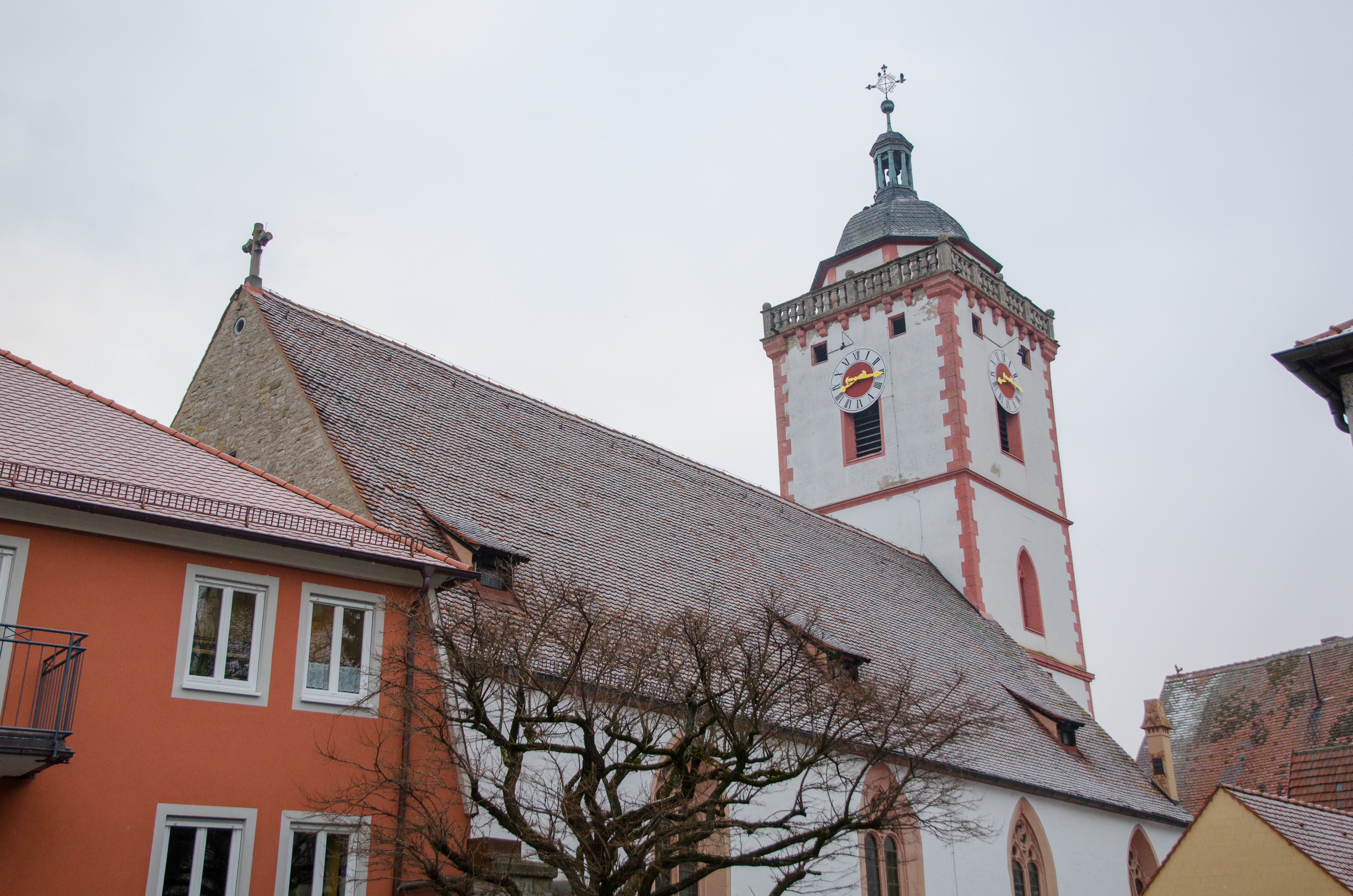 Evang.-Luth. Kirche St. Nikolai in Marktbreit